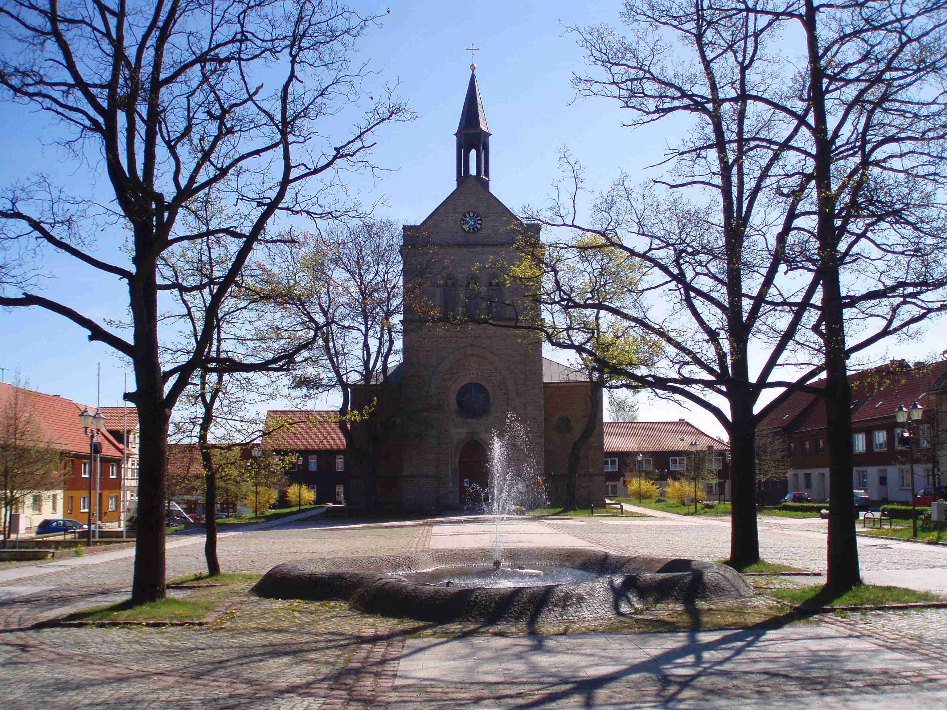 Blick zur Kirche von Hasselfelde